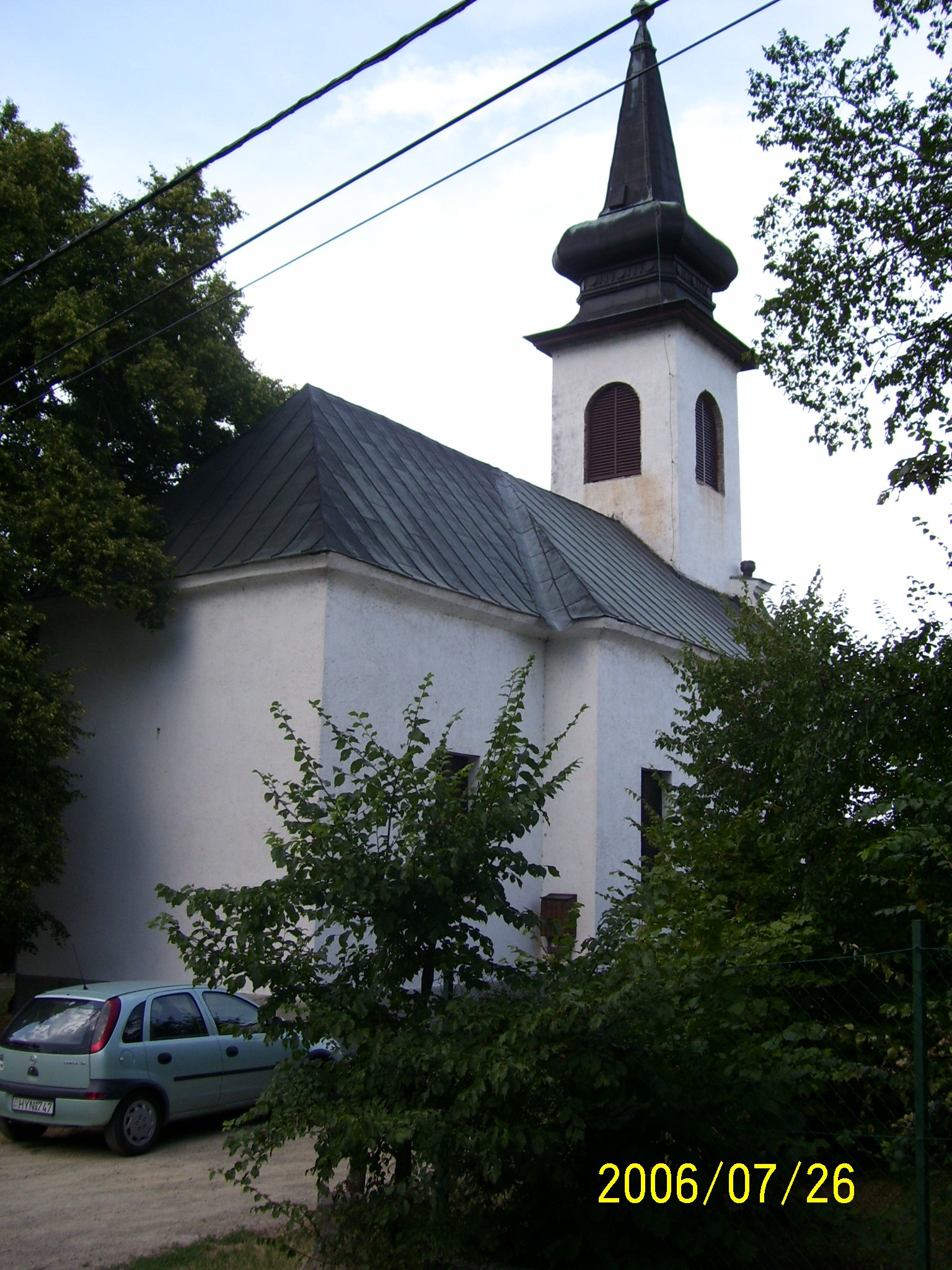 Szent Donát-kápolna, Dunabogdány